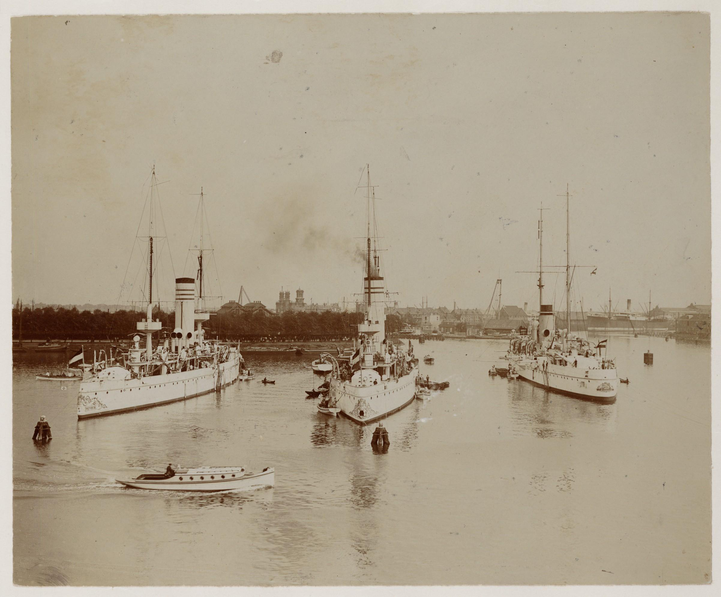 Beschrijving Pantserschepen van de Koninklijke Marine in het Oosterdok Met van links naar rechts de Jacob van Heemskerck, de Evertsen en de Piet Hein, gezien naar de Oosterdoksdoorgang. Documenttype foto Vervaardiger Onbekend Anoniem Collectie Collectie Stadsarchief Amsterdam: foto-afdrukken Datering 4 september 1909 Geografische naam Oosterdok Inventarissen Afbeeldingsbestand OSIM00003001597